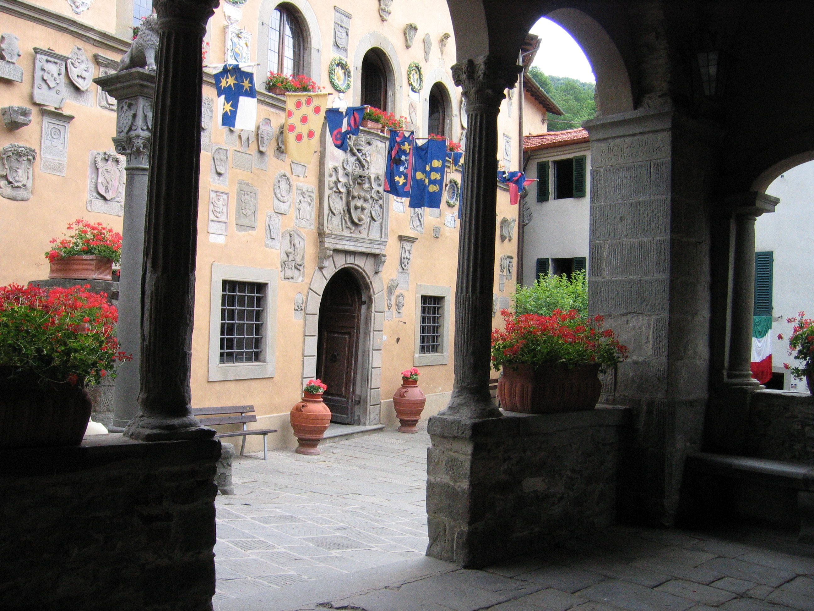 Palazzo Pretorio - Gebouwd in 14de eeuw door de zeven belangrijkste gemeenten in de bergen rond Pistoia